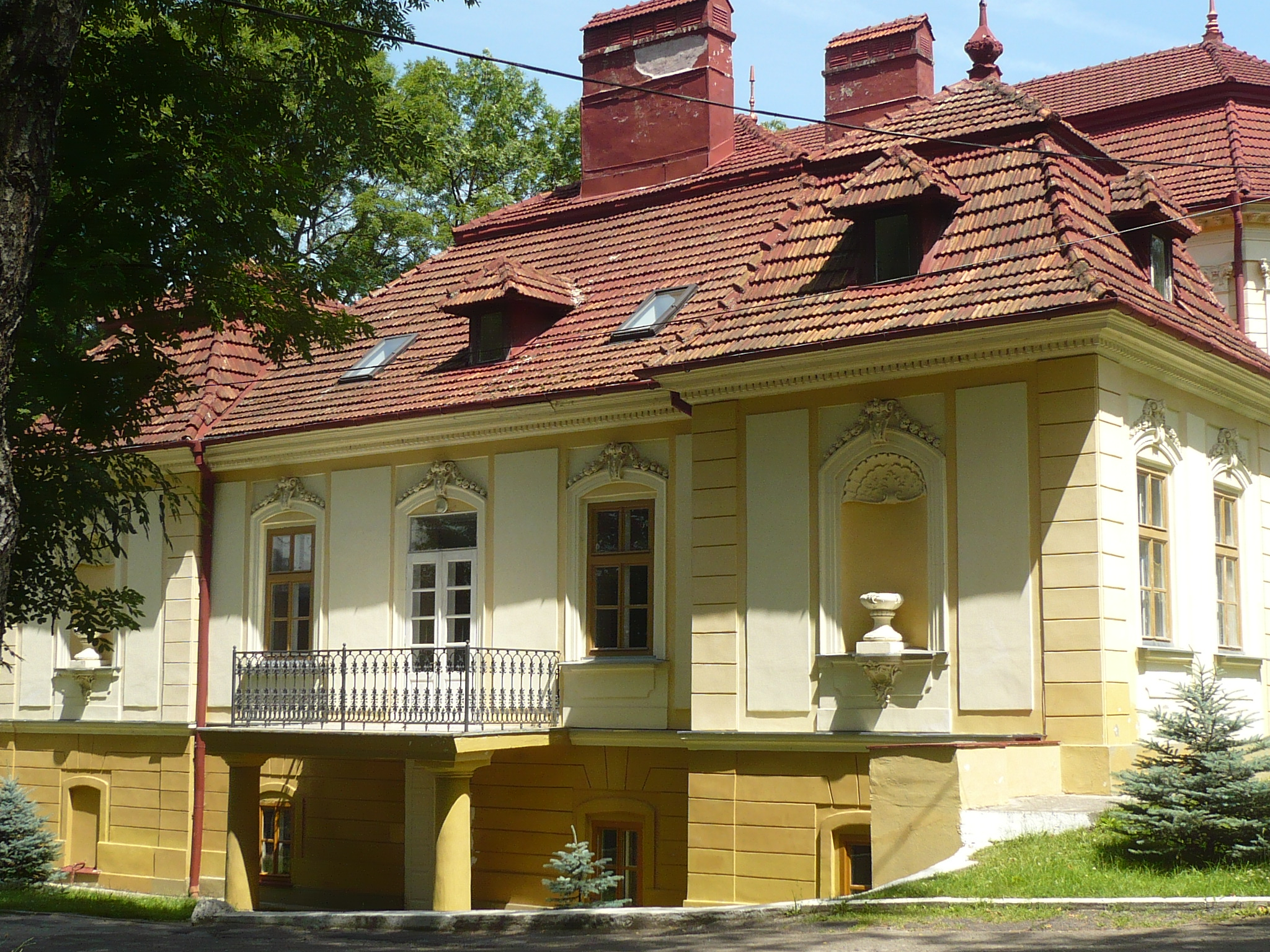 Pałac. Lubień Wielki